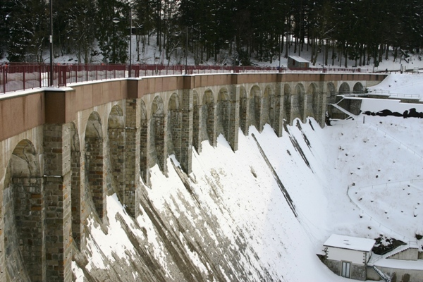 Talspär Robertville vu riets.